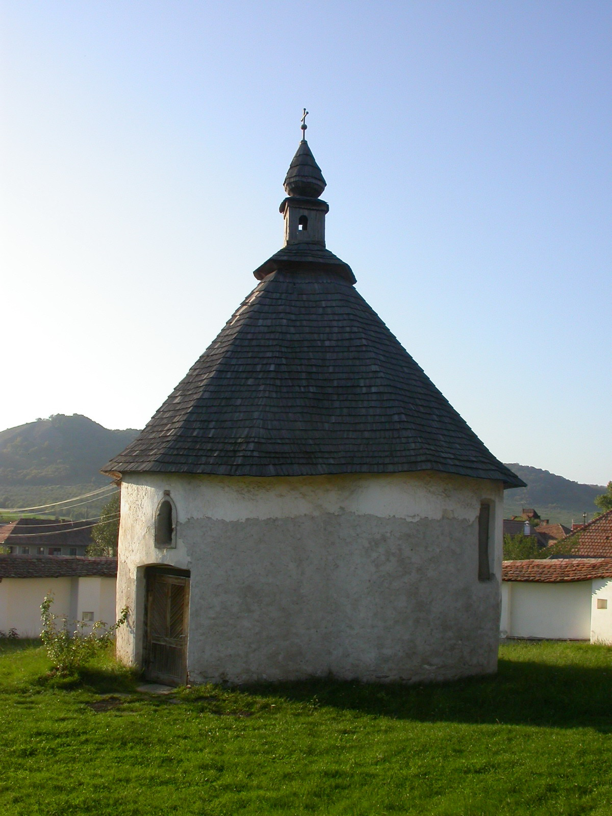 Ansamblul capelei romano-catolice "Inima lui Iisus", sec. XIII - XVI